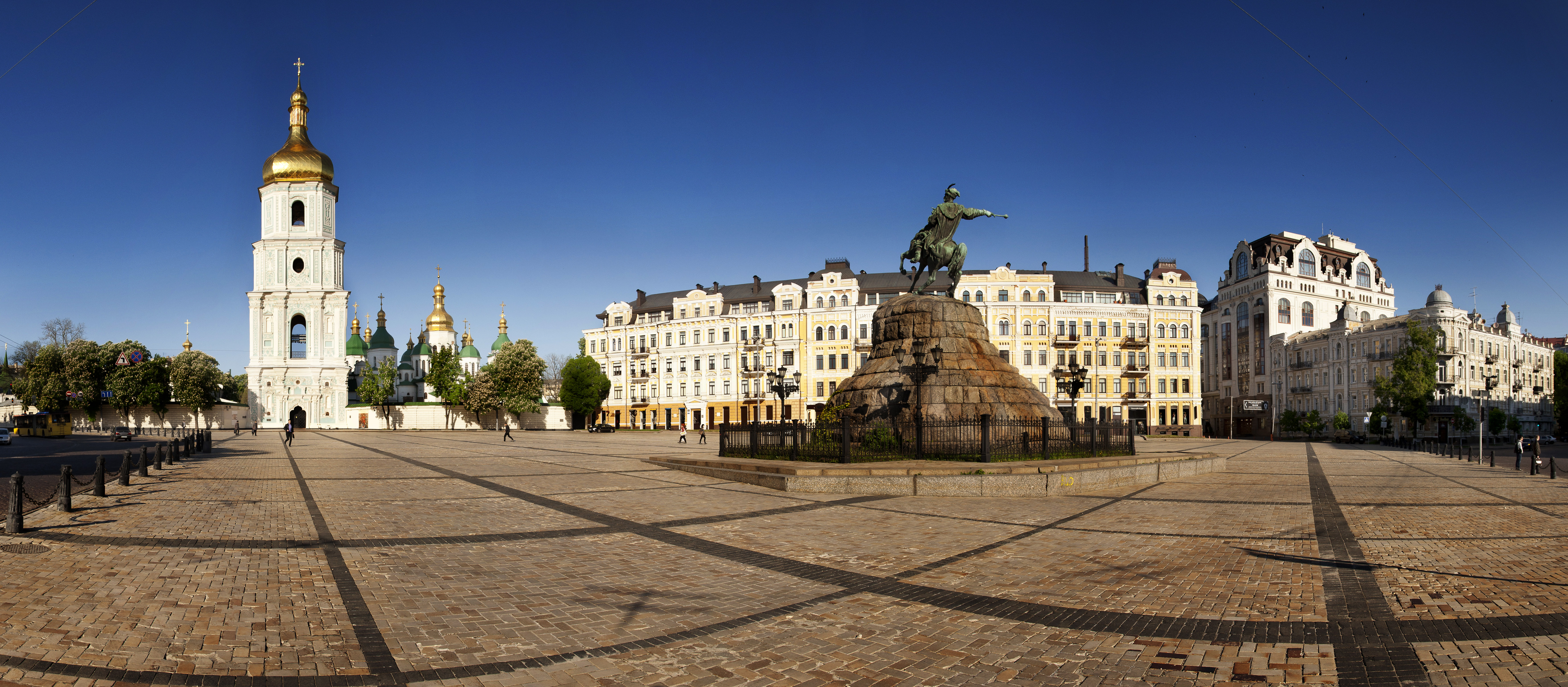 Комплекс Національного заповідника «Софія Київська», Київ, Володимирська вул., 24